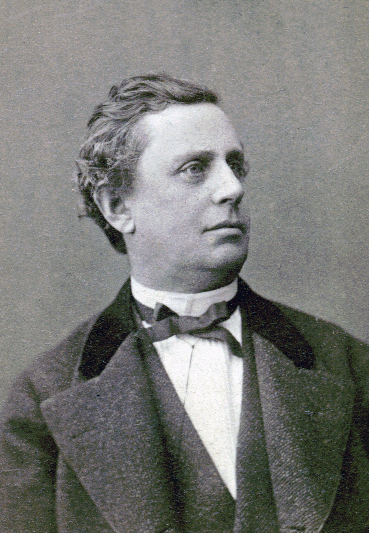 Carl Gustaf Sundberg, skådespelare vid Kungliga Dramatiska teatern 1865